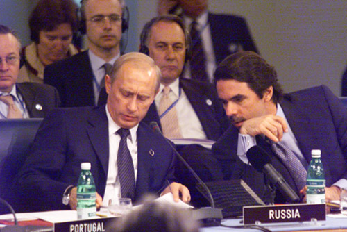 ПРАТИКА-ДИ-МАРЕ (база ВВС Италии). На заседании саммита Россия–НАТО. С Председателем Правительства Испании Хосе Мария Аснаром.